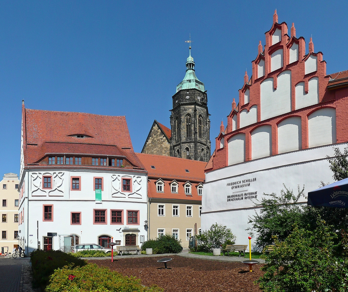 Pirna: Blick von der Frohngasse auf das Canalettohaus (Am Markt 7, links), den Turm der Marienkirche und den spätgotischen Ziergiebel des deutsch-tschechischen Internats (Schlossstraße 13, rechts).